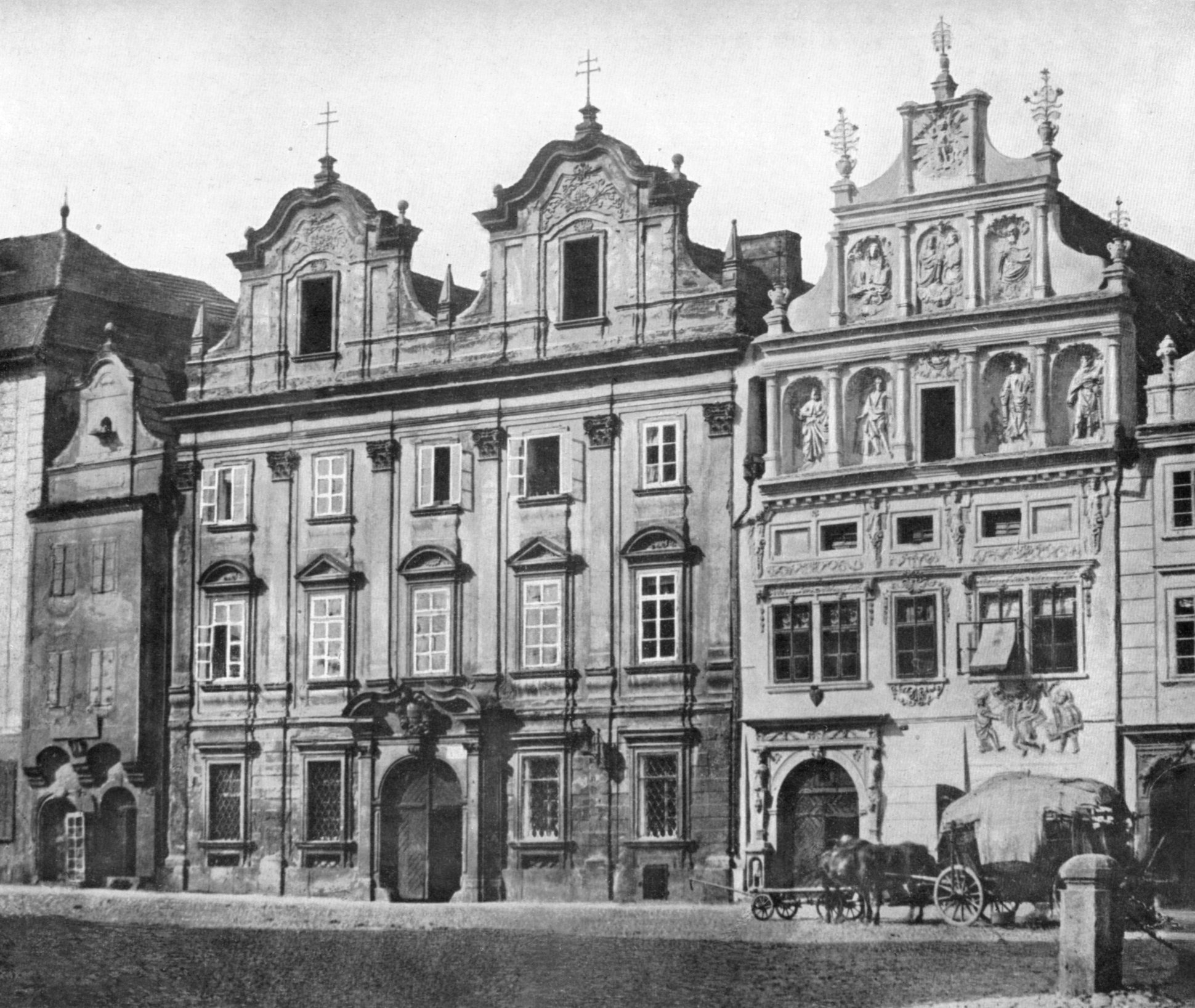 A. Groll - Arciděkanství a dům "U červeného srdce" v Plzni, 1856